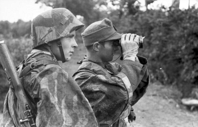 Information added by Wikimedia users.Zwei Angehörige der Wehrmacht, 21. Panzer-Division[1]